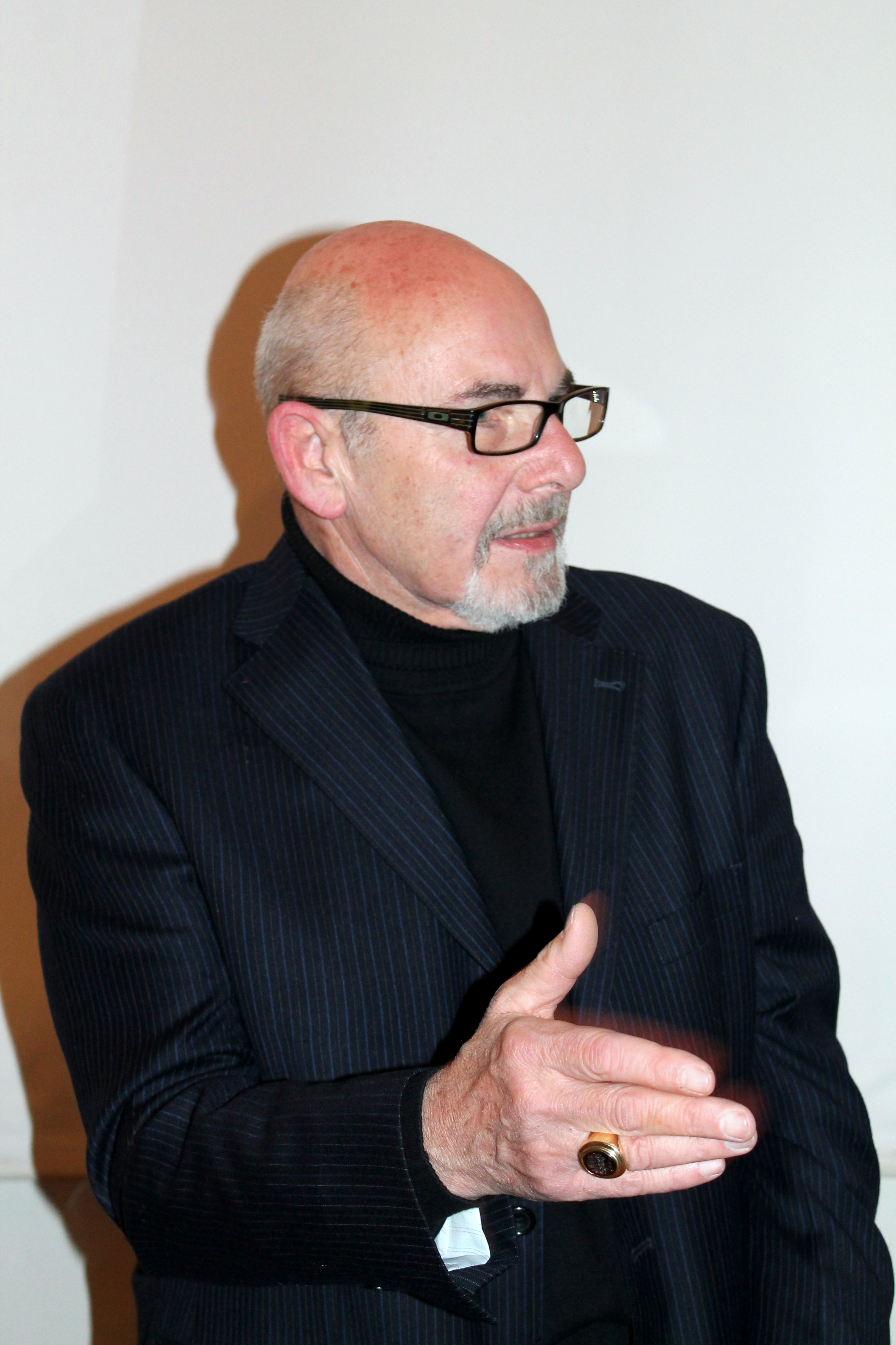 Frank H. Mahnke